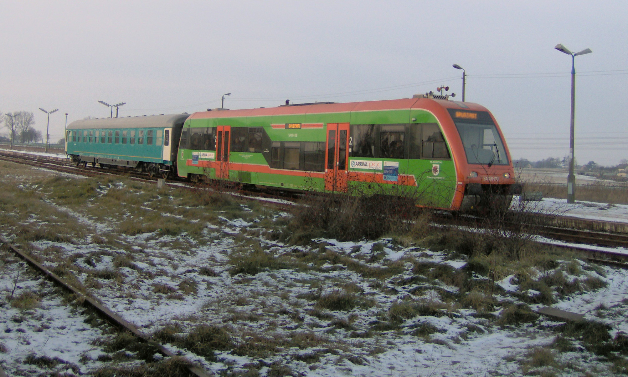 SA106 w barwach Arriva PCC z wagonem doczepnym typu Bm na przystanku w Kornatowie.